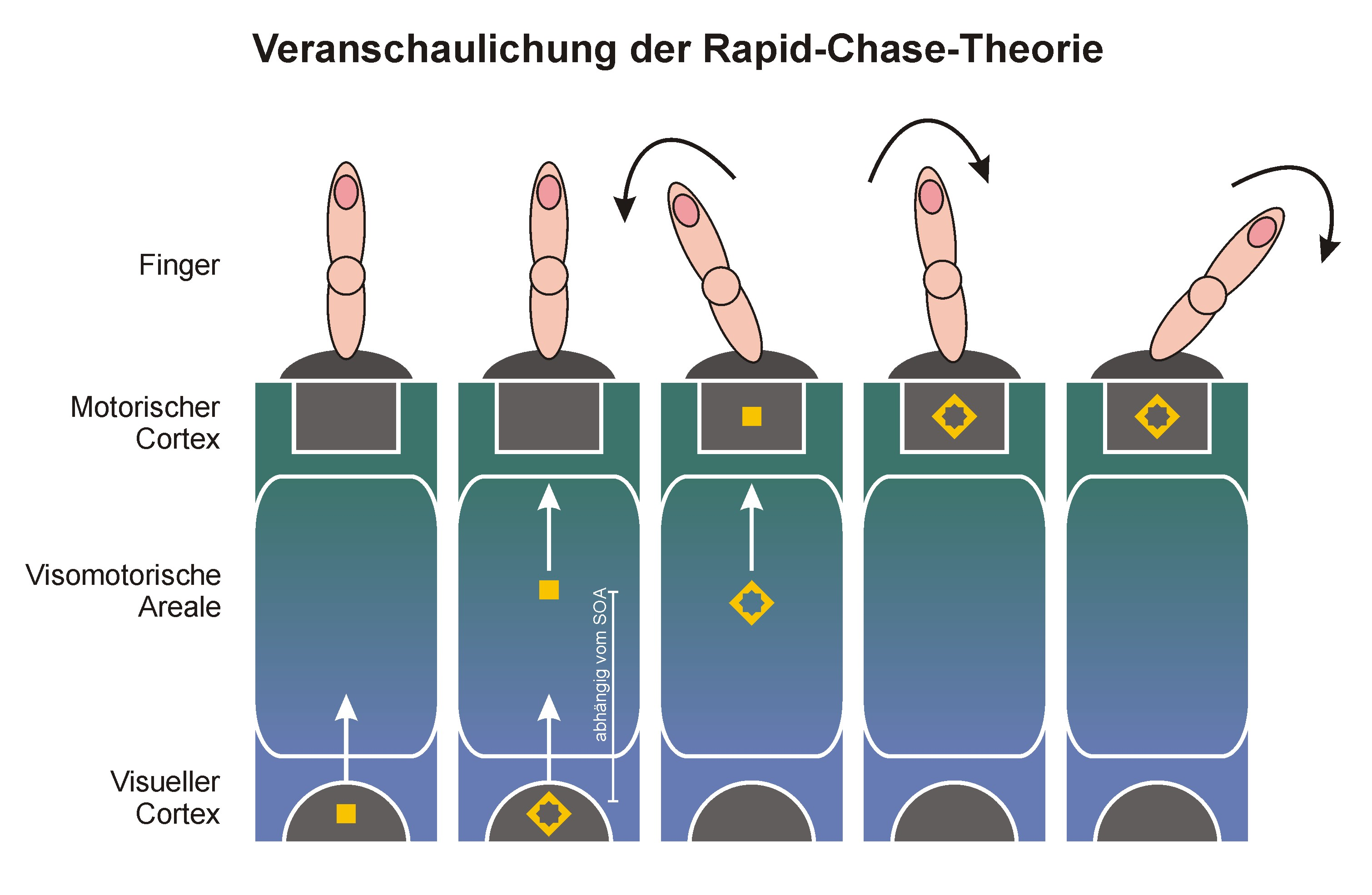 Erklärung der Rapid-chase-Theorie